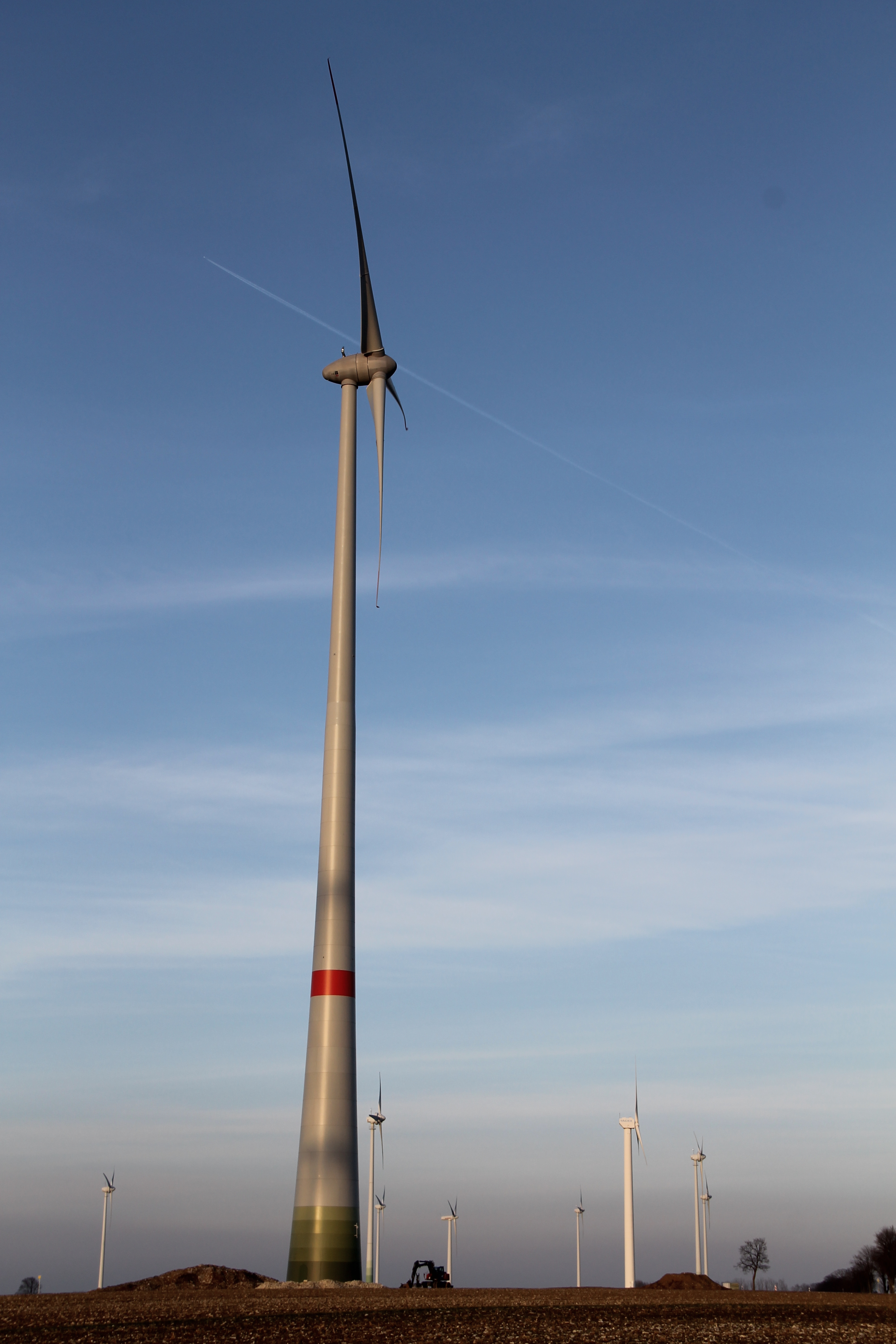 E-92 im Windpark Lichtenau-Asseln